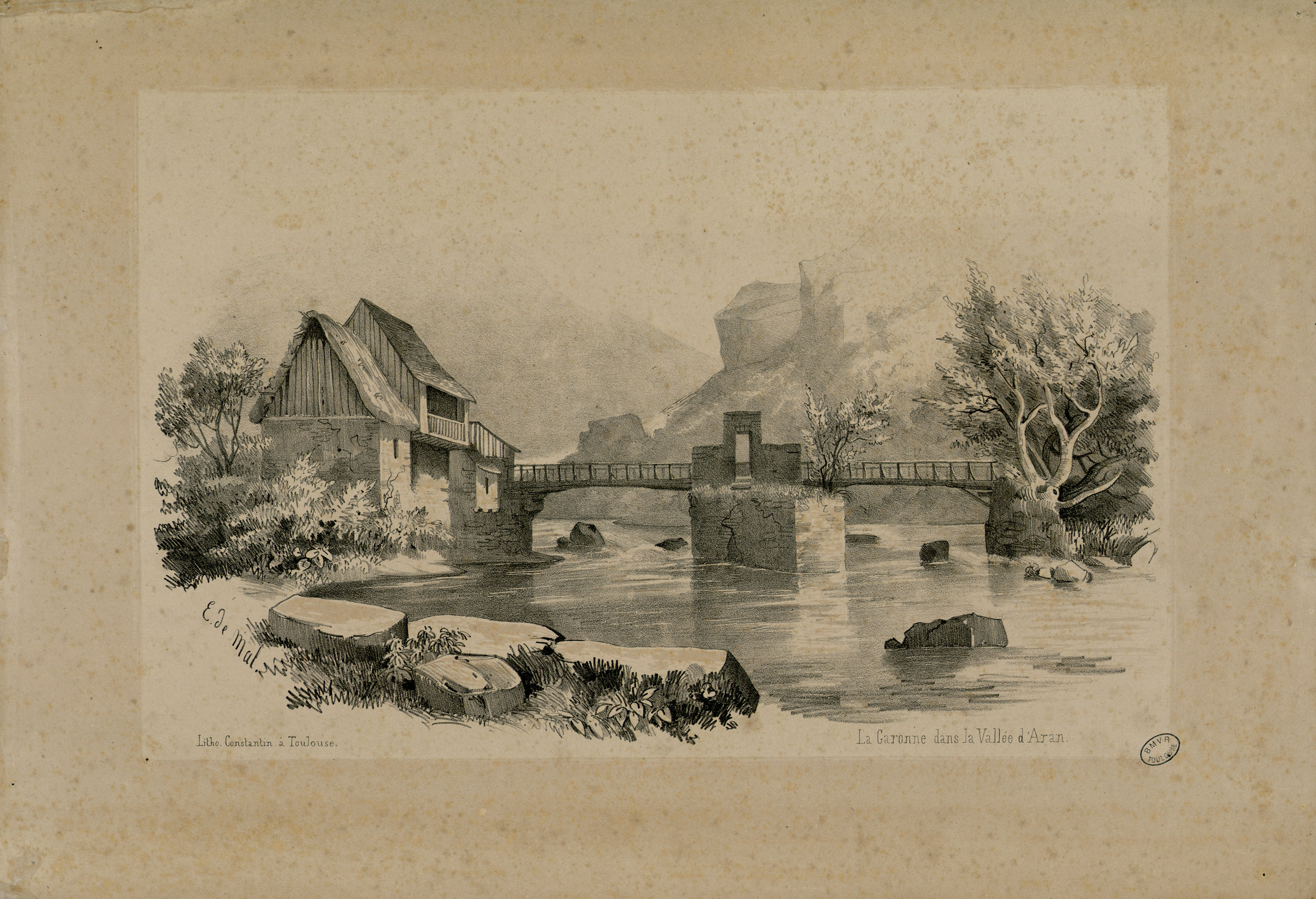 Fait partie d'un recueil de 23 planches lithographiées en camaïeu Ancely, René (1876 - 1966). Possesseur